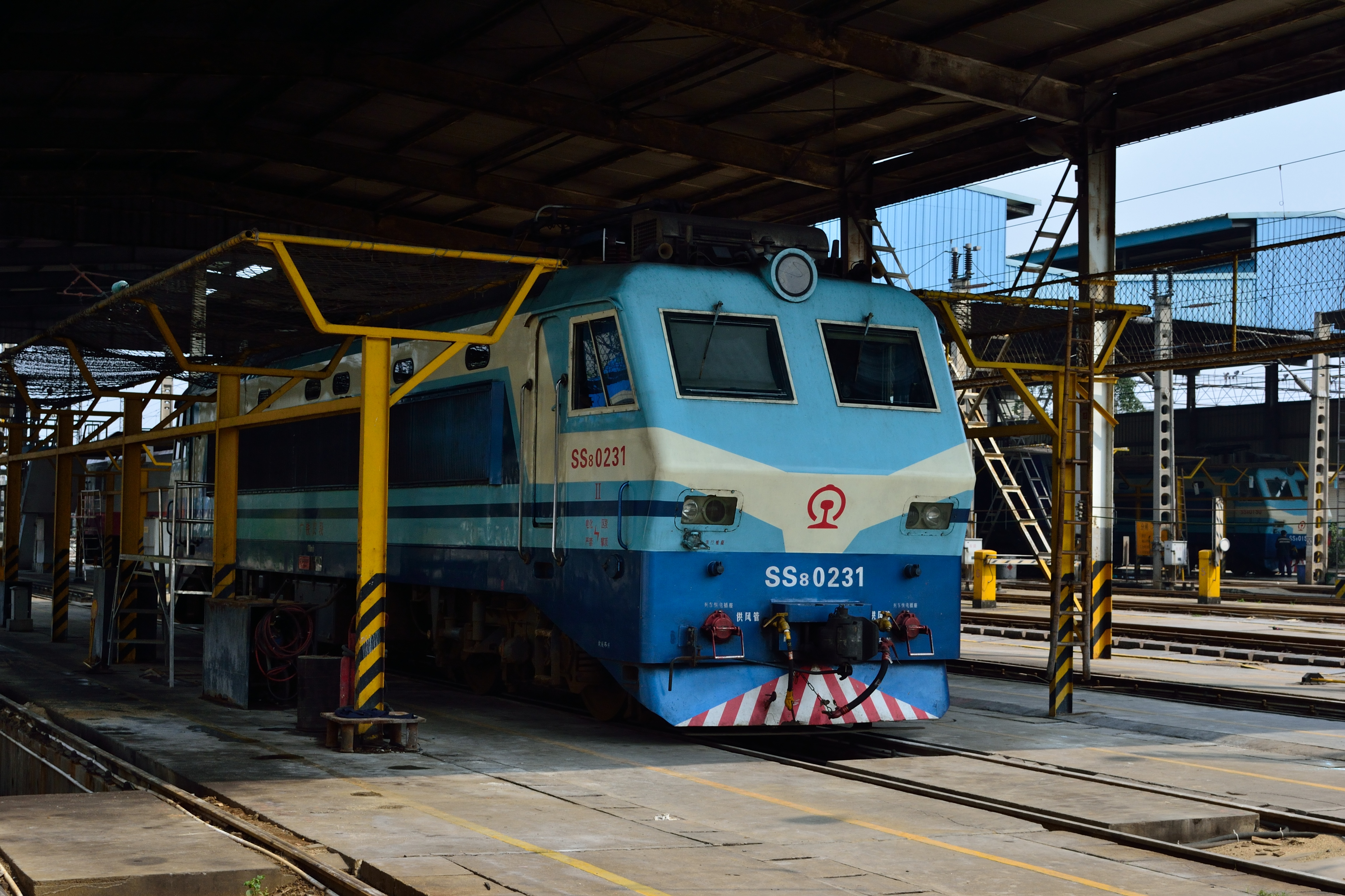 检修中的SS8-0231，摄于广机。